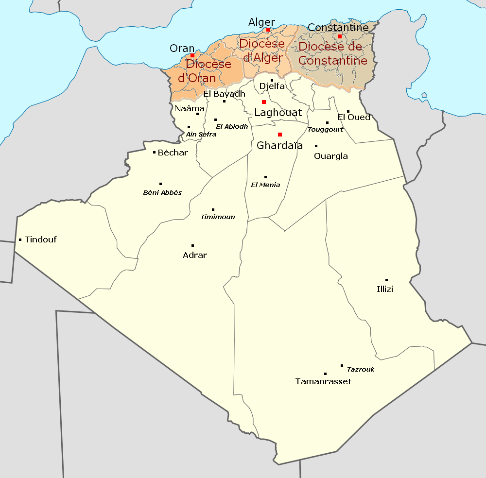 Localisation du diocèse catholique de Laghouat-Ghardaïa en Algérie.